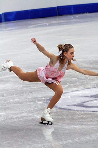 Ленаэль Гийерон-Горри (Франция) на чемпионате мира по фигурному катанию среди юниоров 2012